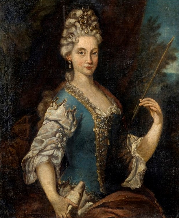 Description